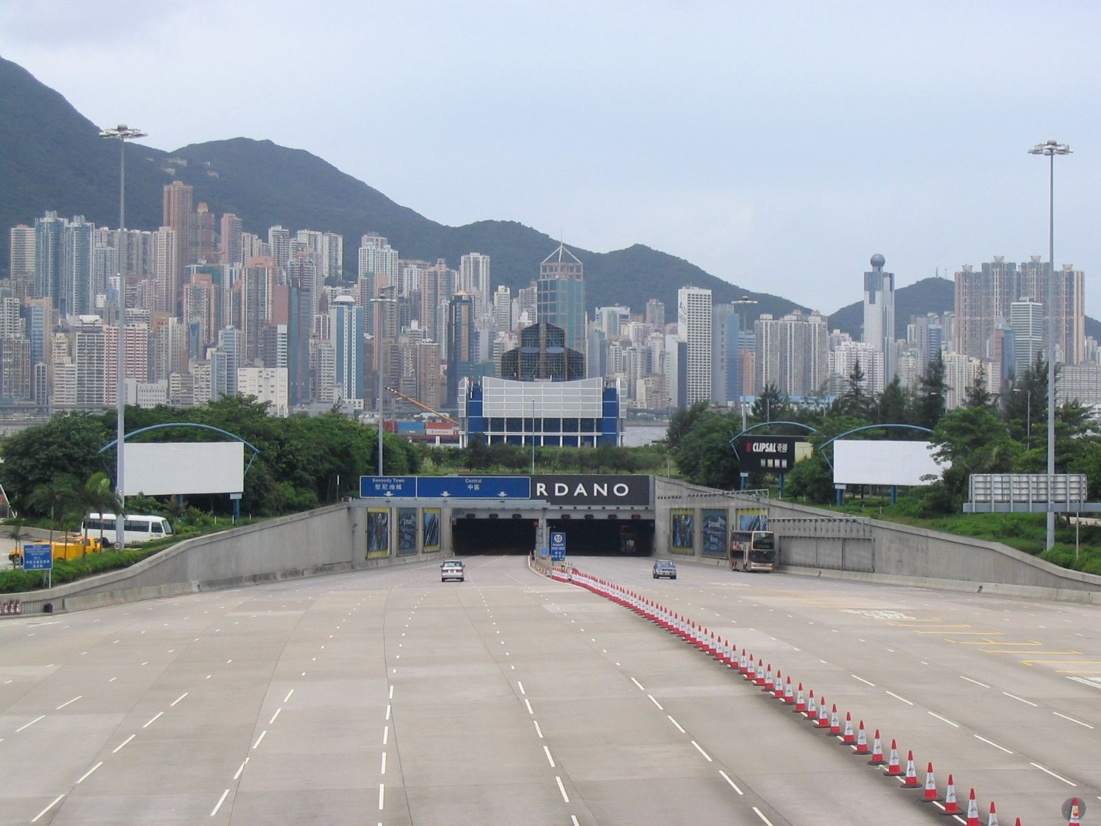 西區海底隧道-九龍入口 Western Harbour Tunnel, Kowloon Entrance